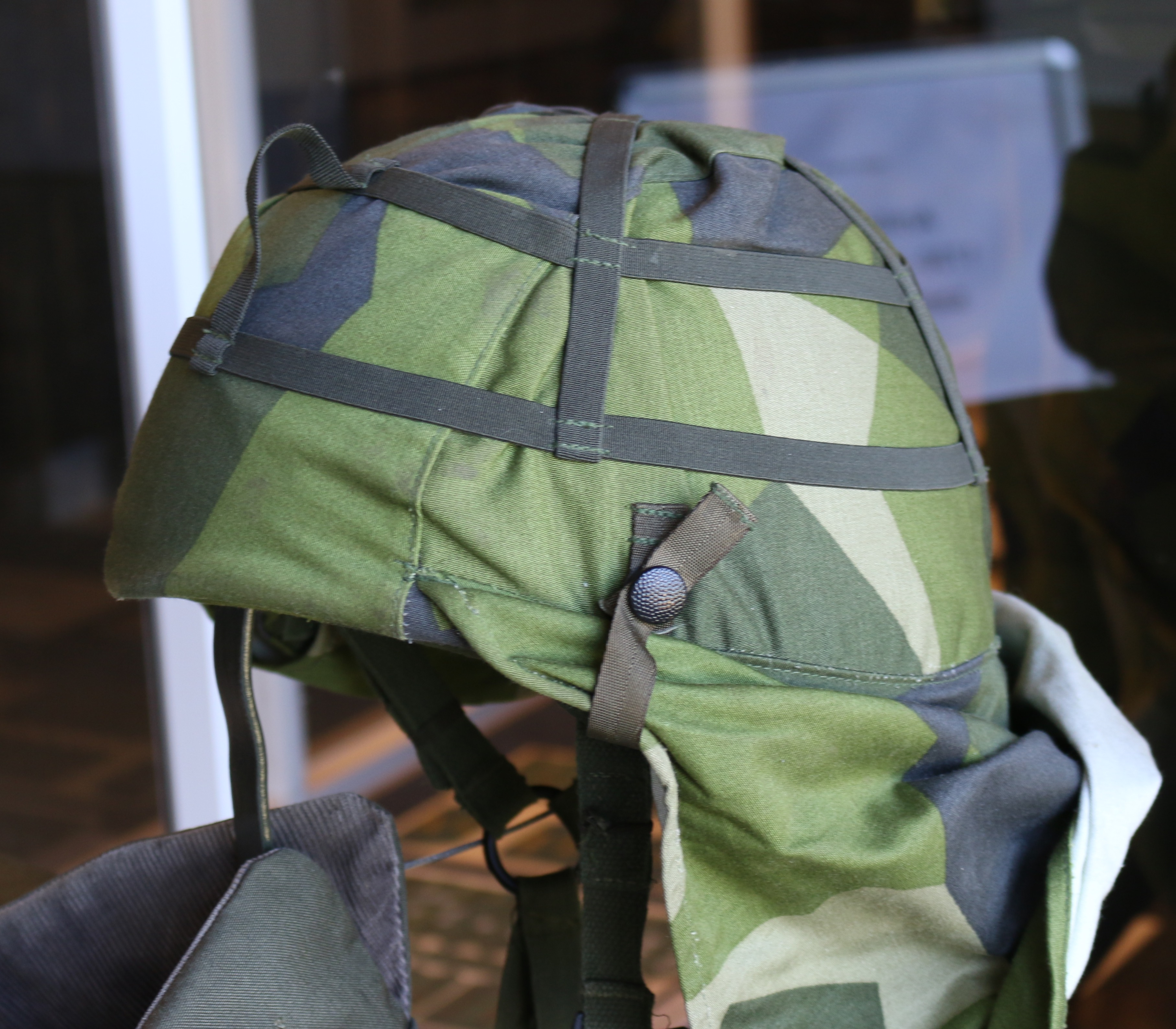 Hjälm M90 Artillerimuseet 2917